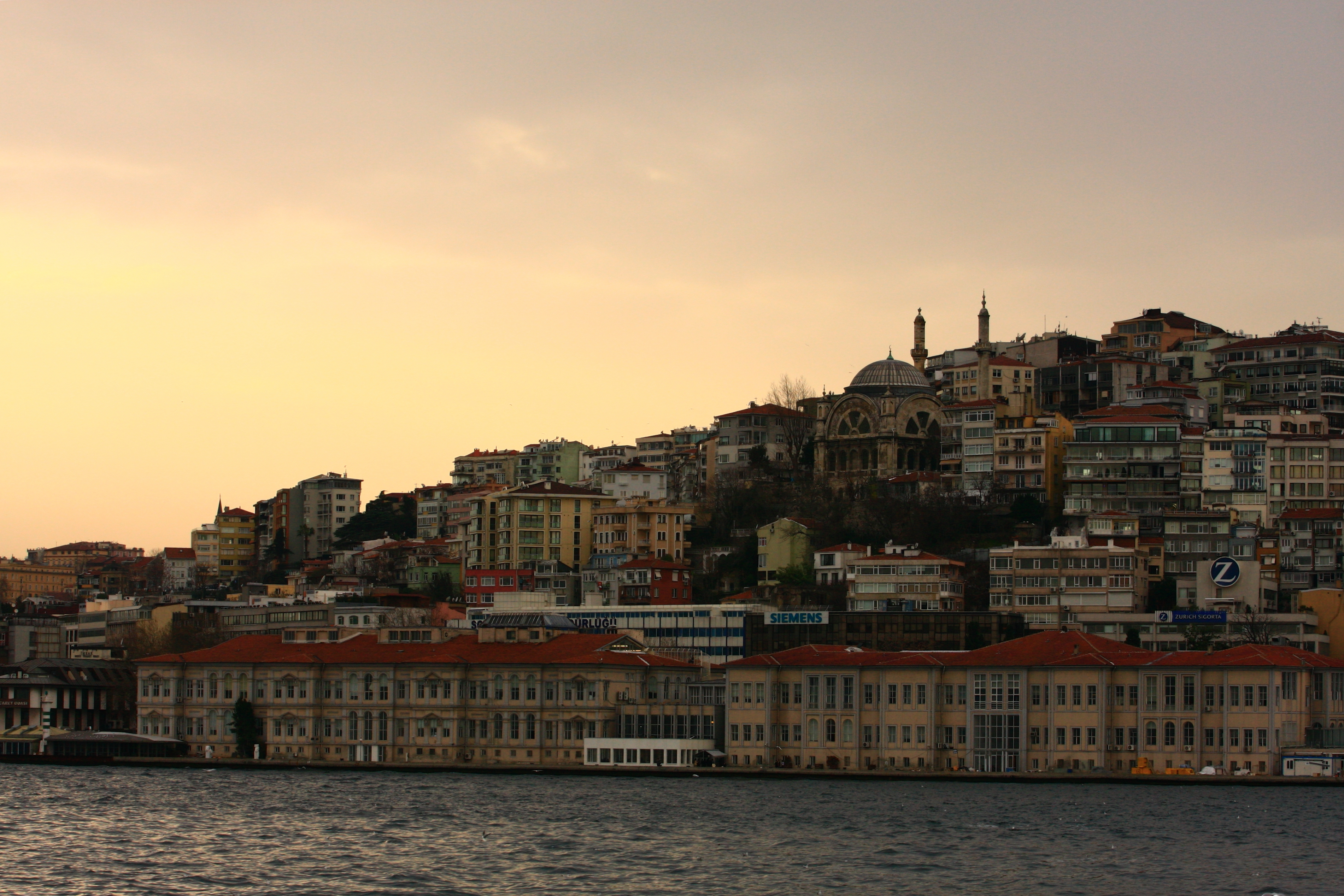 Istanbul